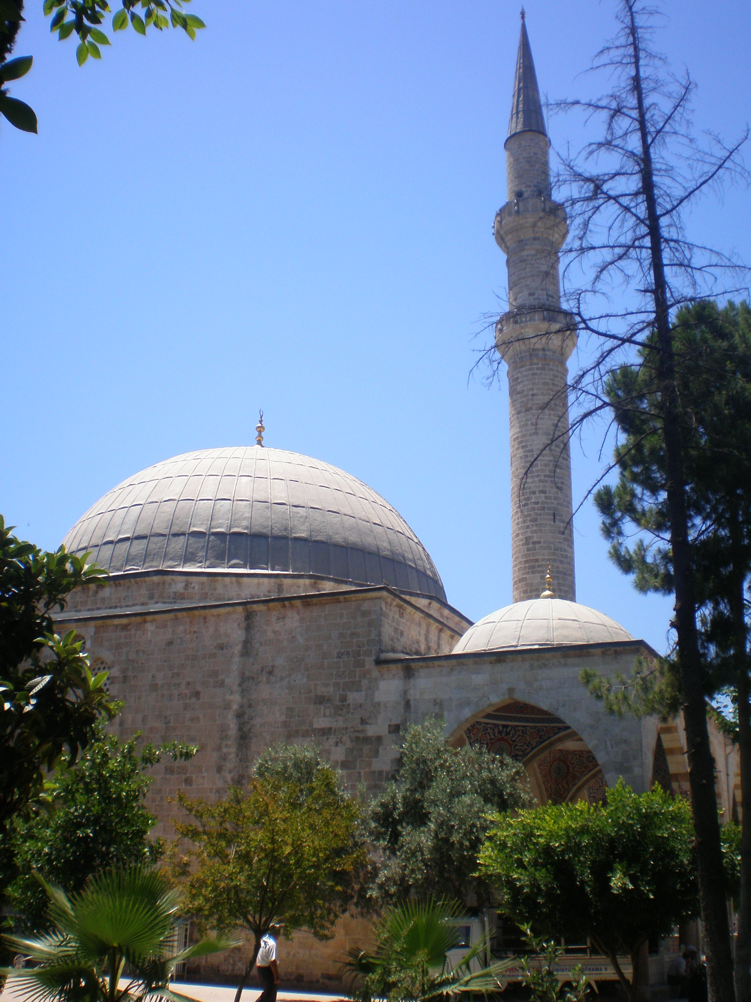 Murat Paşa Mosque, Antalya